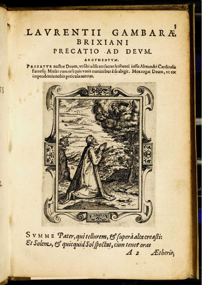 Laurentii Gambarae Brixiani, Precatio ad Deum, página 3 de Rerum Sacrarum Liber, Amberes, ex officina Christophori Plantini, Amberes, 1577. Grabados atribuidos a Bernardino Passeri que firma el grabado de portada